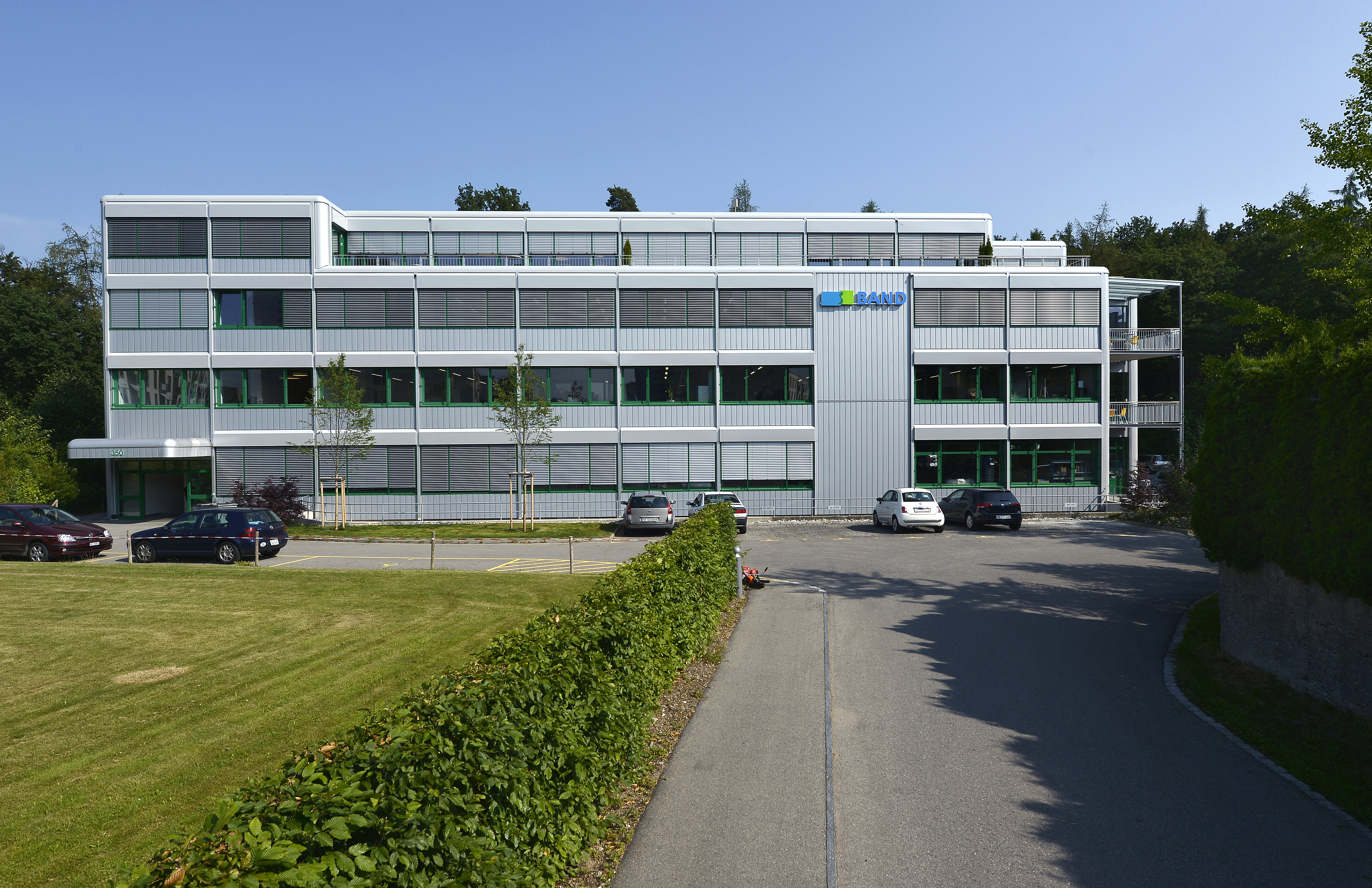 Standort der Band-Genossenschaft an der Murtenstrasse in Bern